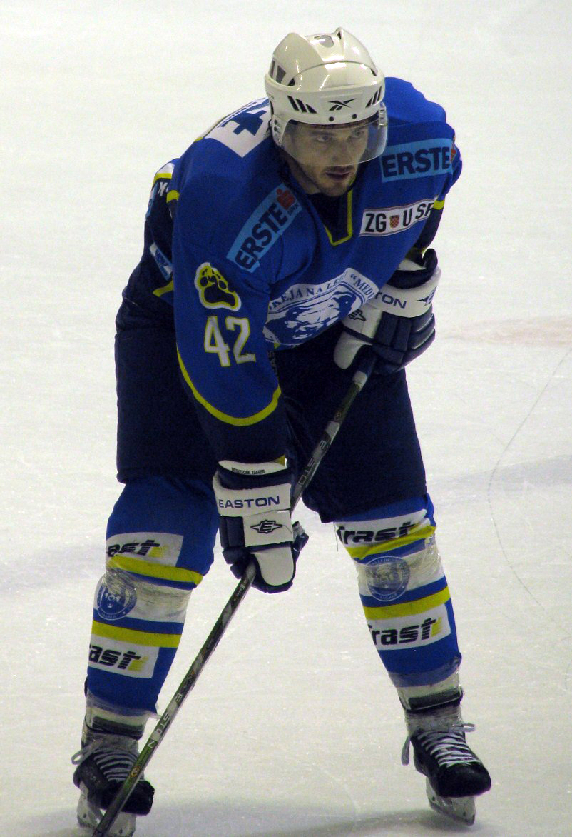 Martin Conrad 3 11102009.jpg